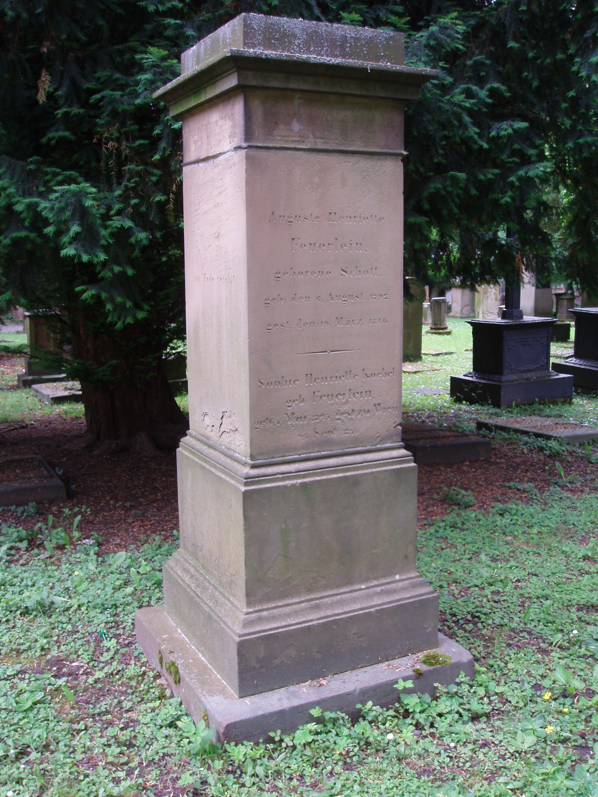 Grab auf dem Hoppenlaufriedhof